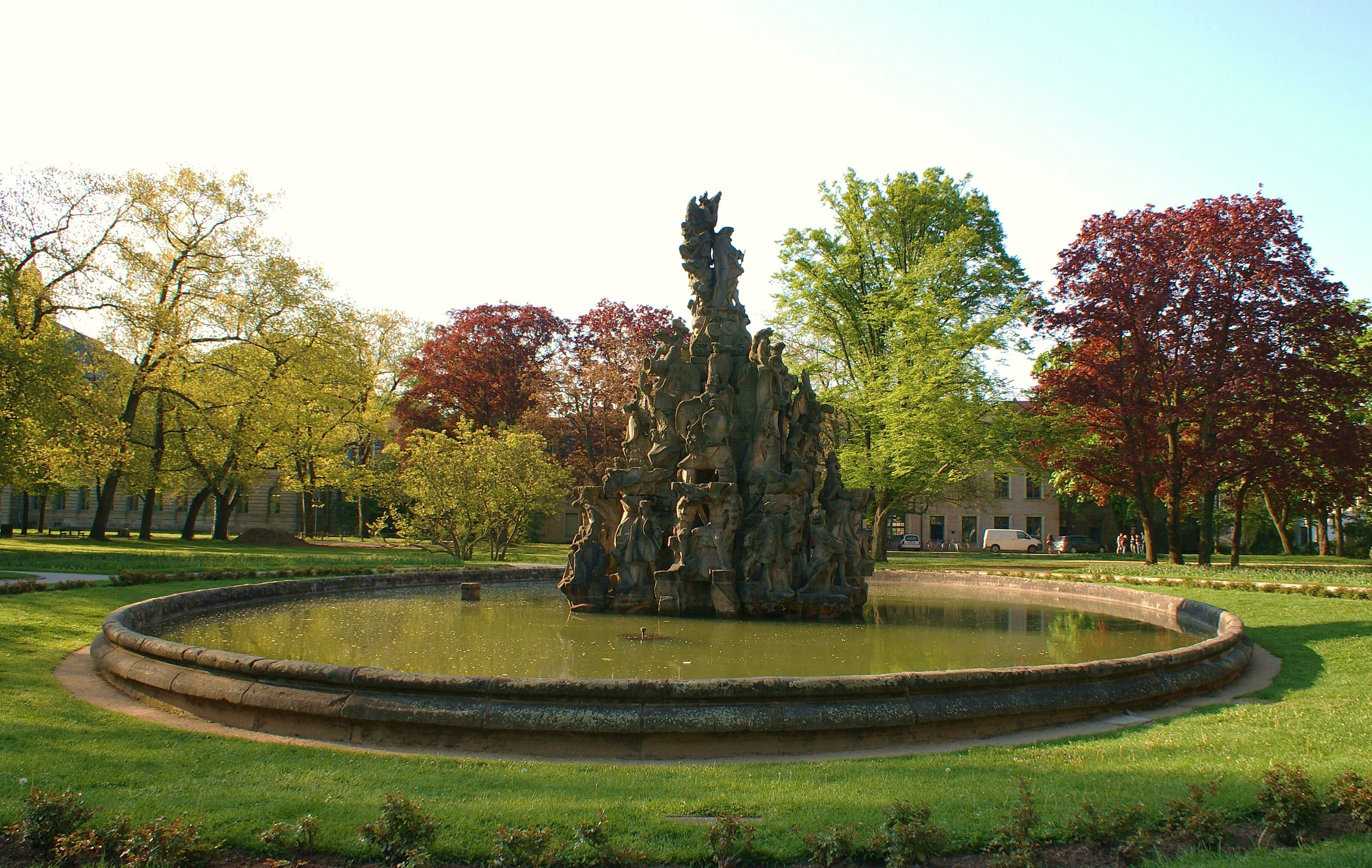 Hugenottenbrunnen Erlangen